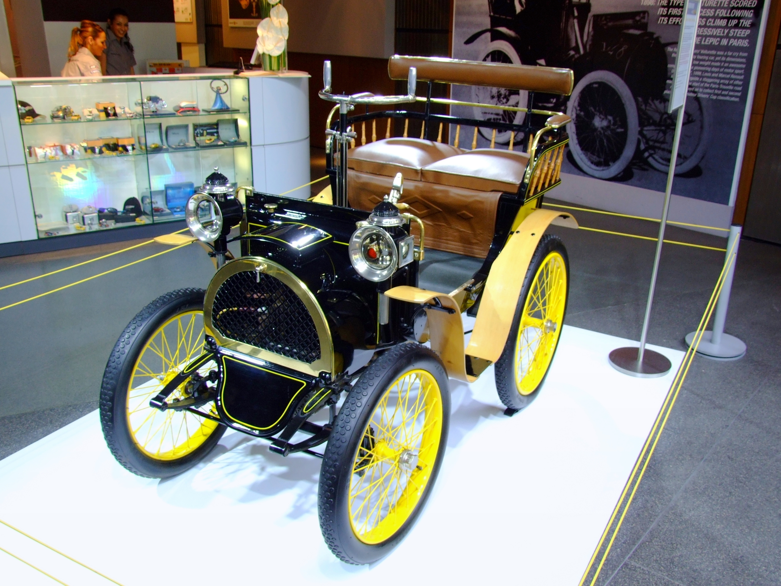 Renault at Paris